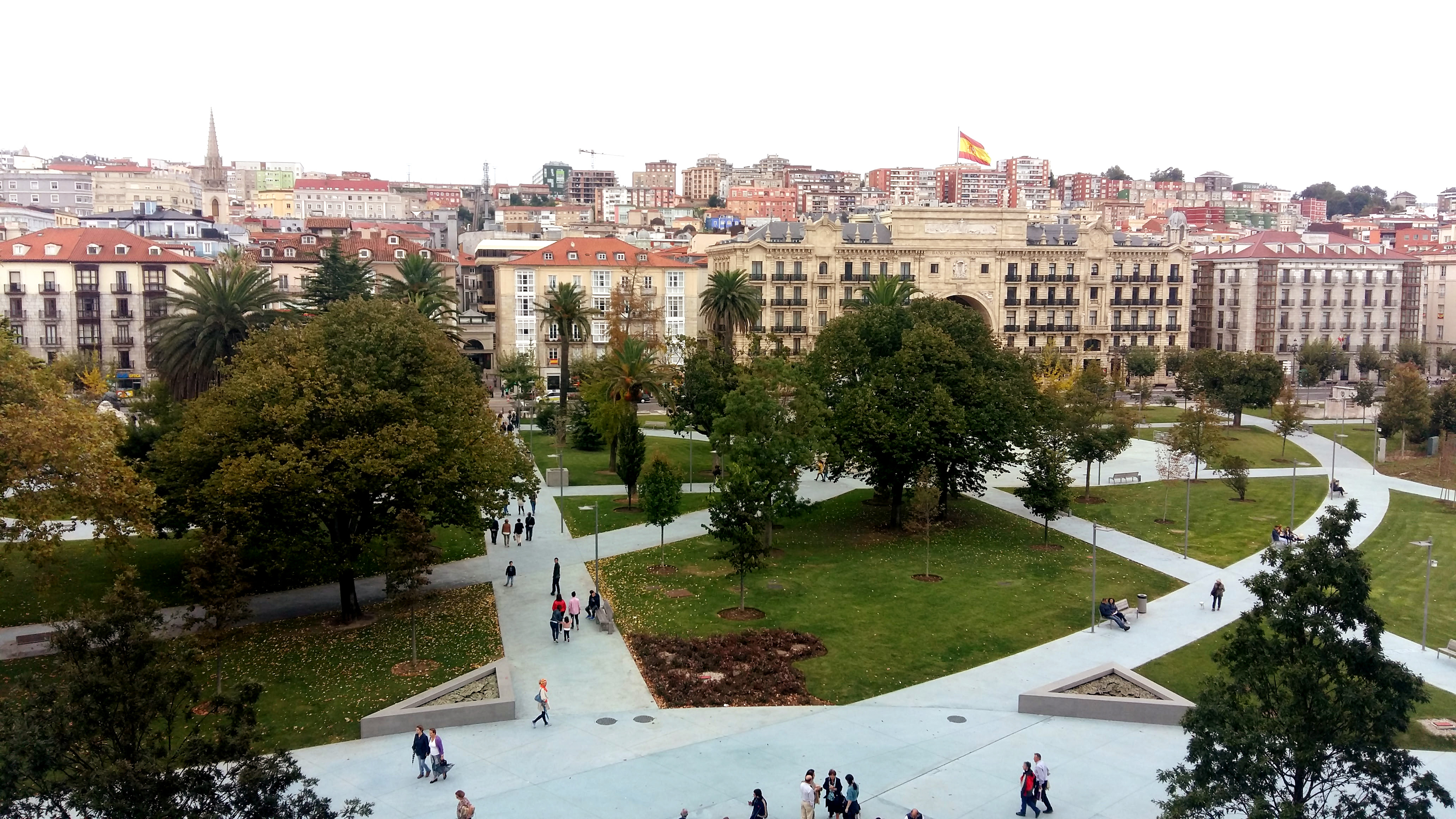 Vista de los Jardines de Pereda en la ciudad de Santander, España. Al fondo la sede del Banco Santander.